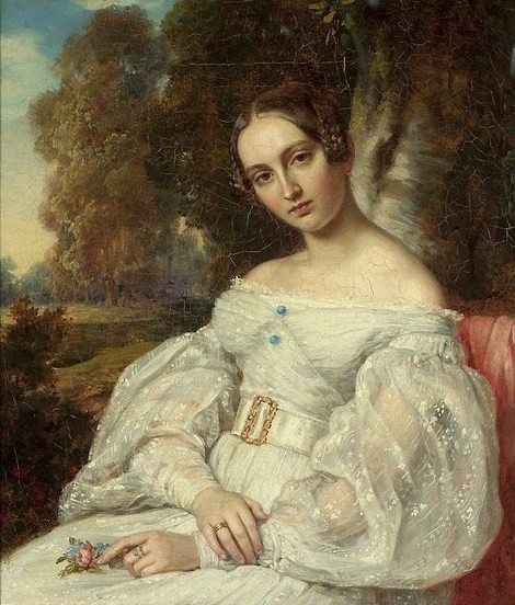 Ольга Станиславовна Потоцкая (1802-1861), жена с 1824 года Л. А. Нарышкина.